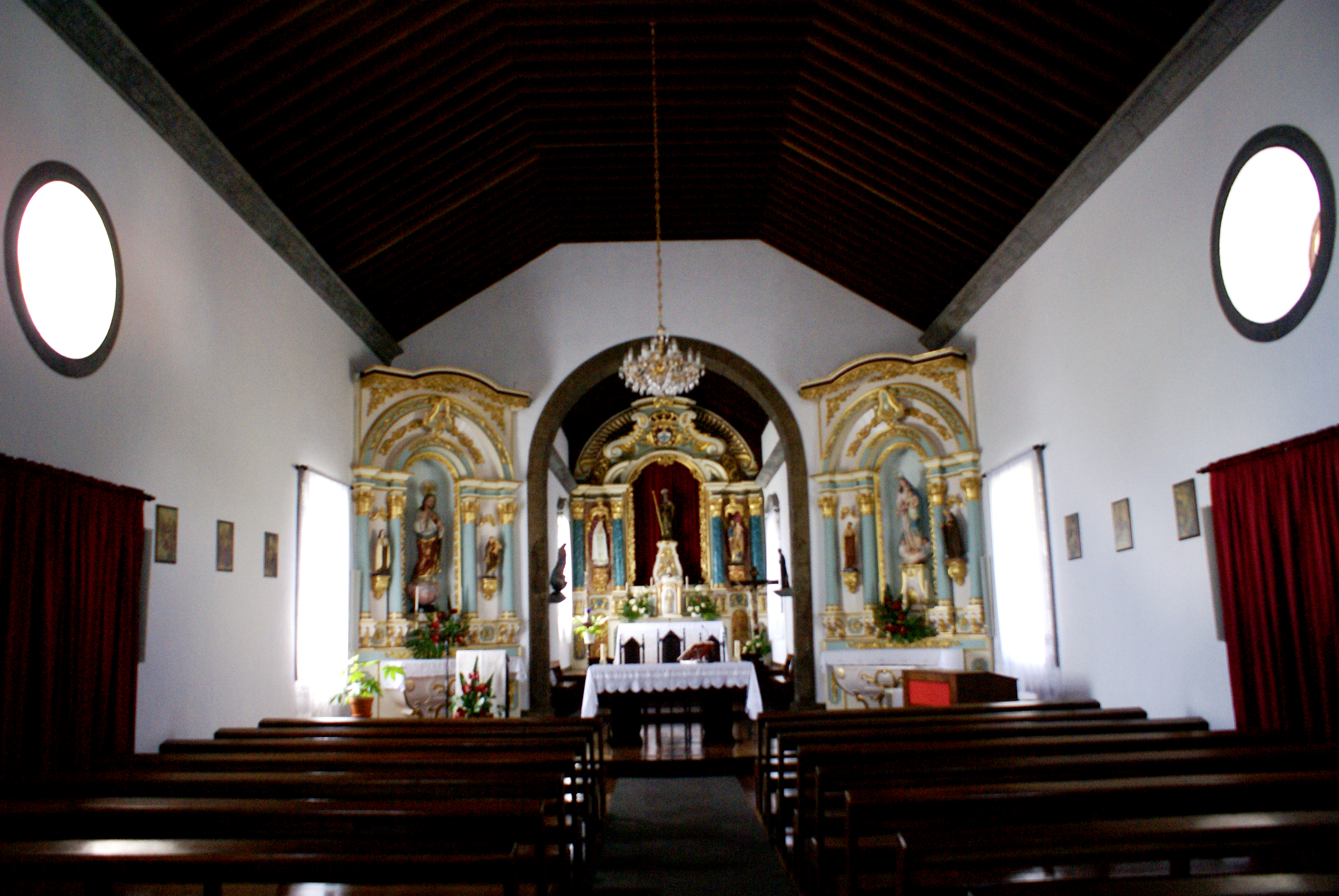 Igreja de Santo Amaro, interior, Velas, ilha de São Jorge, Açores